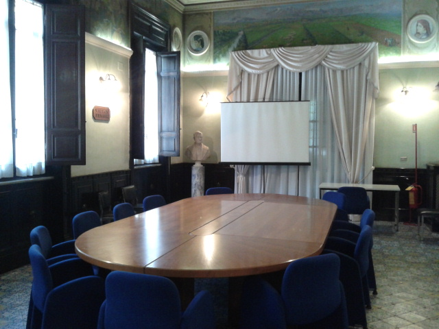 La sala del Principe